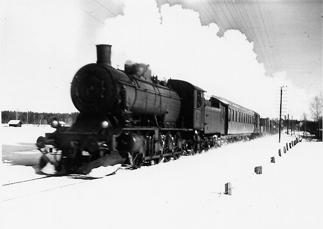 Stockholm - Västerås Bergslagens Järnväg, SWB, köpte under åren 1912 - 1920 sammanlagt 11 stycken godstågslok från Vagn & Maskinfabriken i Falun och Nydqvist & Holm i Trollhättan. Loken fick littera M3 och numrerades 61 - 67, 73 - 74 samt 81 - 85.